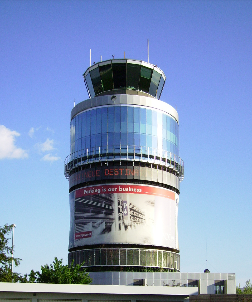 Flughafentower des Flughafens Graz